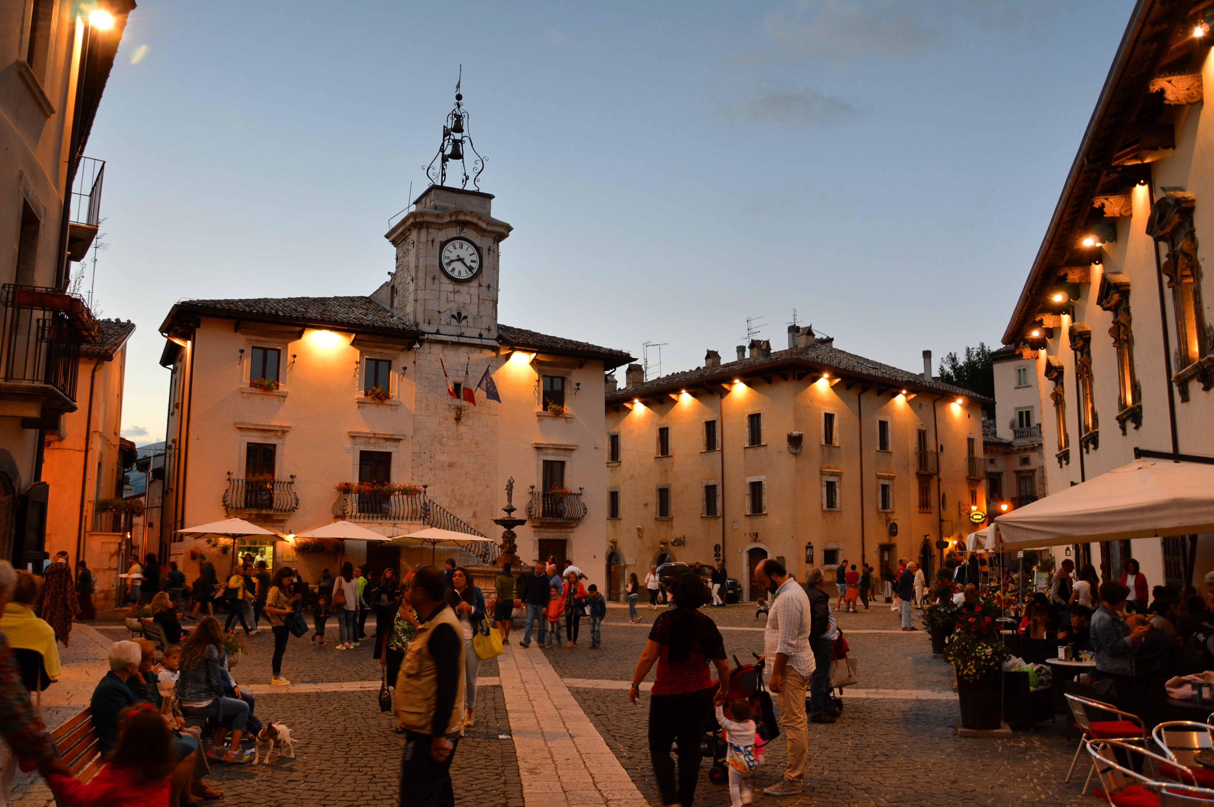 Pescocostanzo